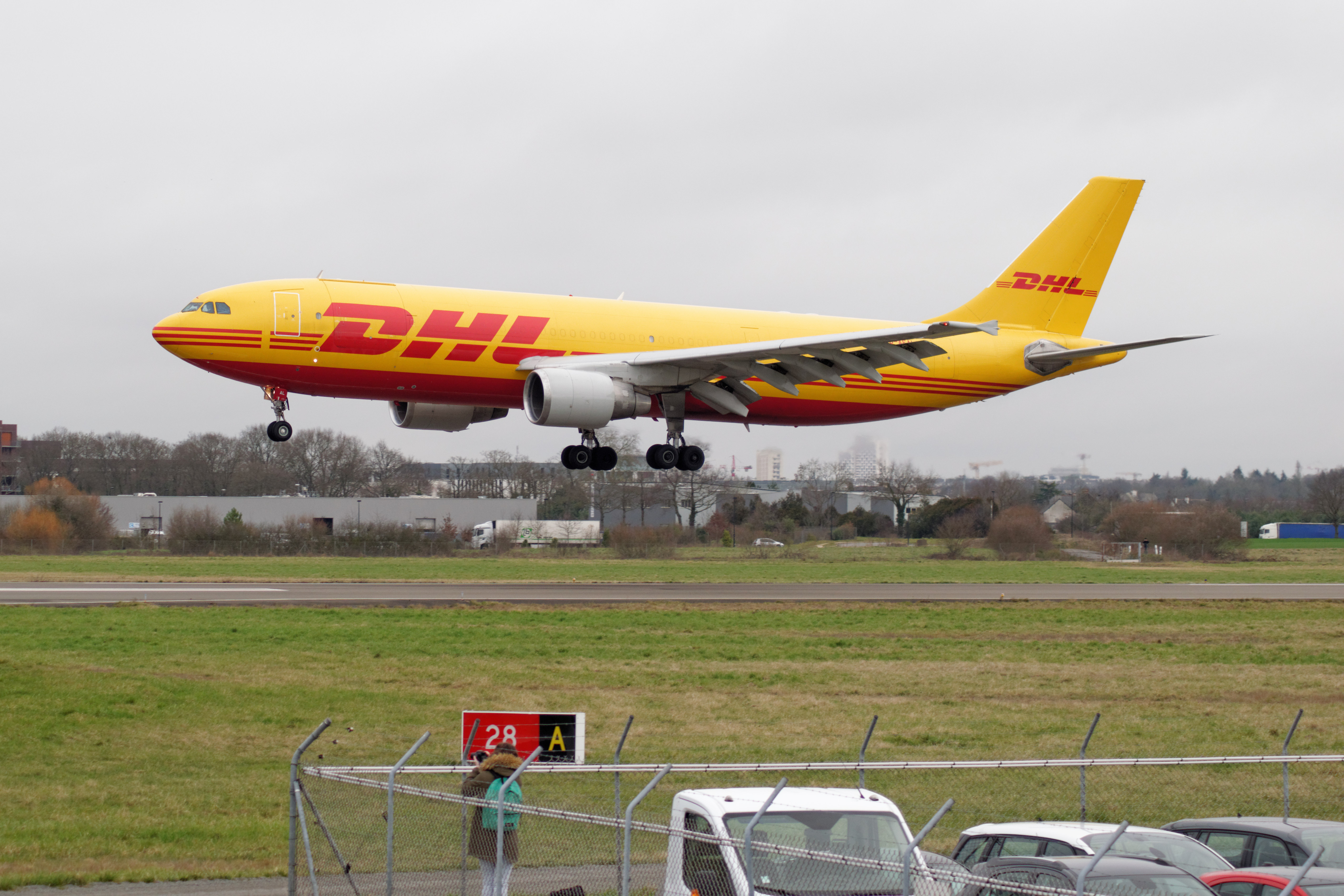 Airbus A300 DHL @ Rennes